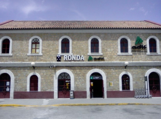 Estación de Ronda, Julio de 2009.